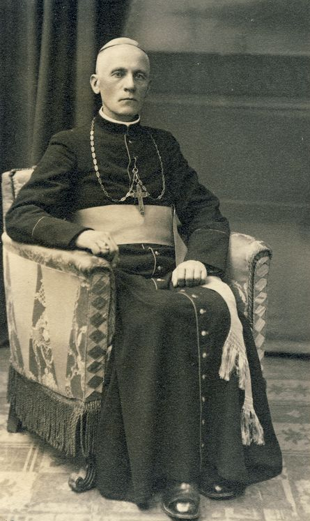 Teofilius Matulionis (1873 m. birželio 22 d. Kudoriškyje, Alantos valsčius – 1962 m. rugpjūčio 20 d. Šeduvoje, Radviliškio rajonas) – Lietuvos arkivyskupas, kankinys, Dievo tarnas (1990 m.).